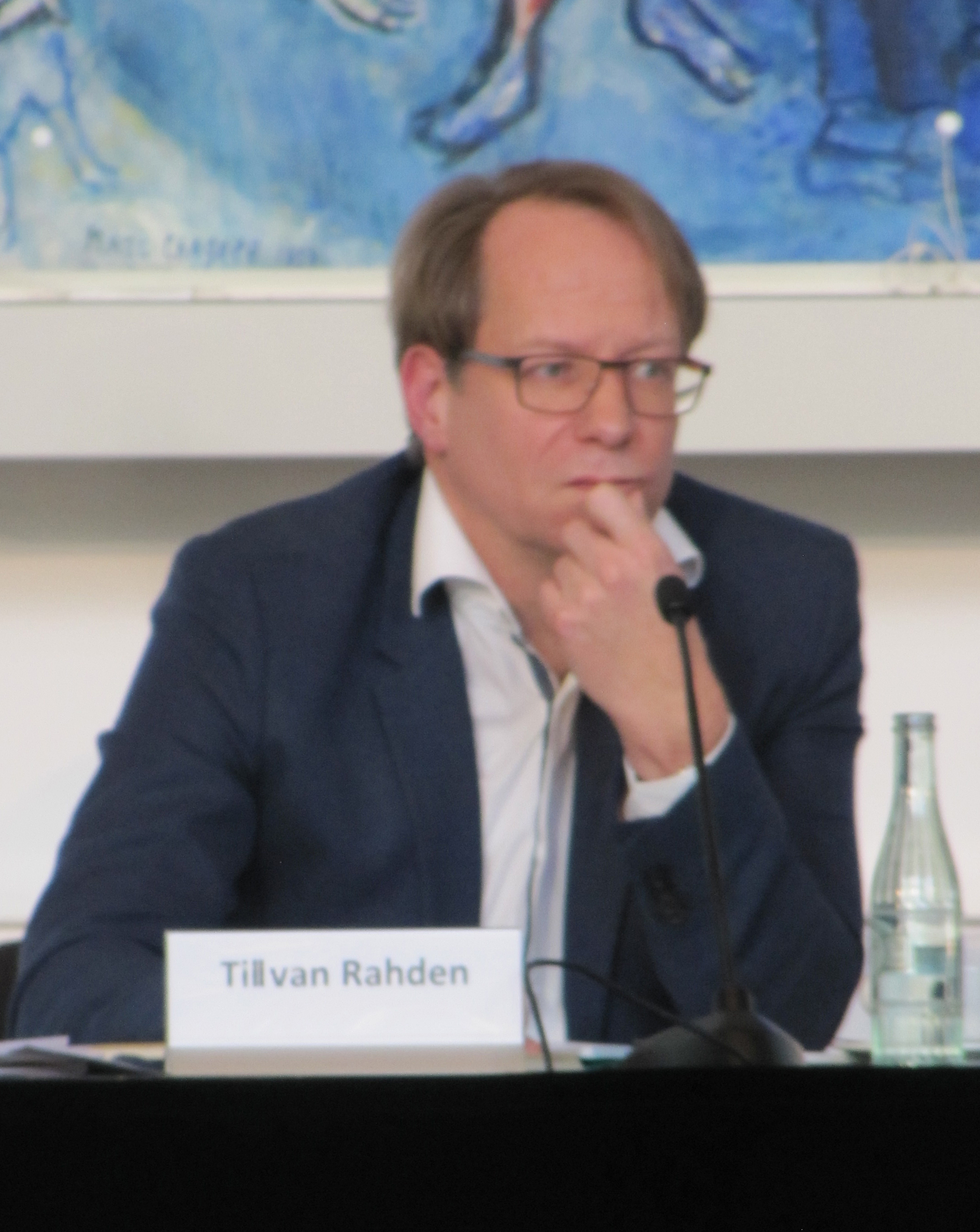 Podiumsdiskussion der 46. Römerberggespräche, am 3. November 2018, Till van Rahden im Chagall-Saal des Schauspielhauses in Frankfurt am Main.